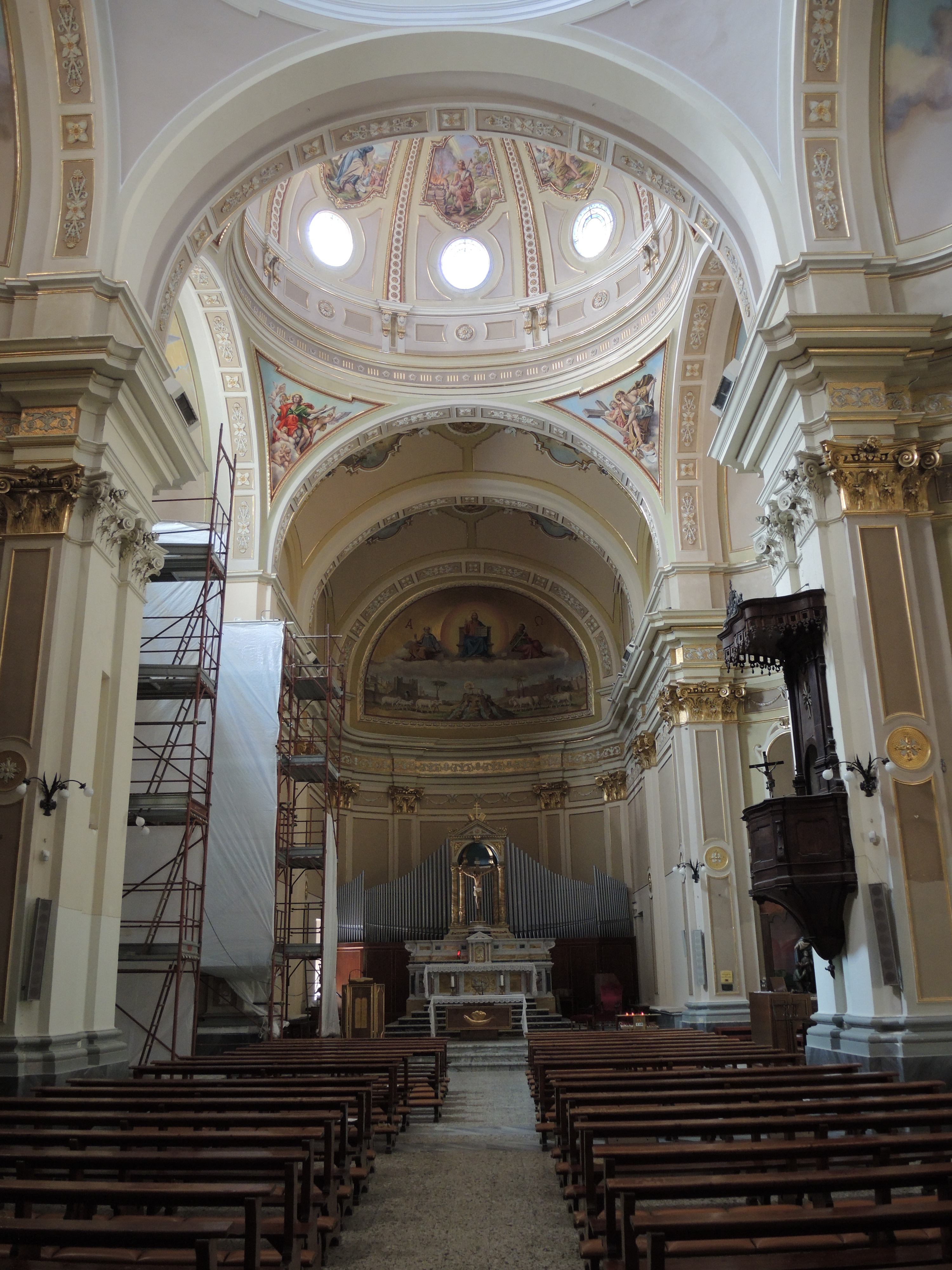 Orsogna: Chiesa di San Nicola